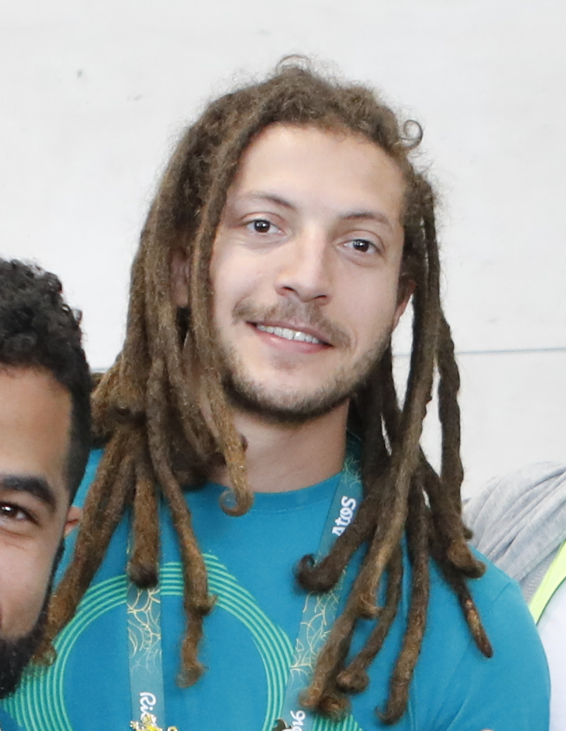 Rio de Janeiro - Fábio Chiuffa na Vila Olímpica dos Jogos Rio 2016 (Fernando Frazão/Agência Brasil)